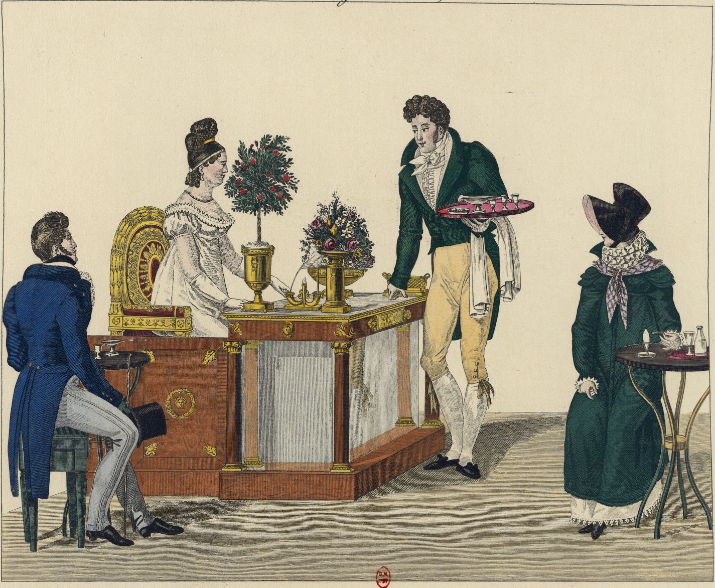 Planche intitulée La Belle Limonadière, éditée en 1816 selon le site : Reproduite ici d'après le site Gallica de la BNF : et extraite de l'album Le Bon Genre publié en 1827. Il s'agit du portrait d'une célèbre Parisienne : Madame Romain dite : la Belle Limonadière.